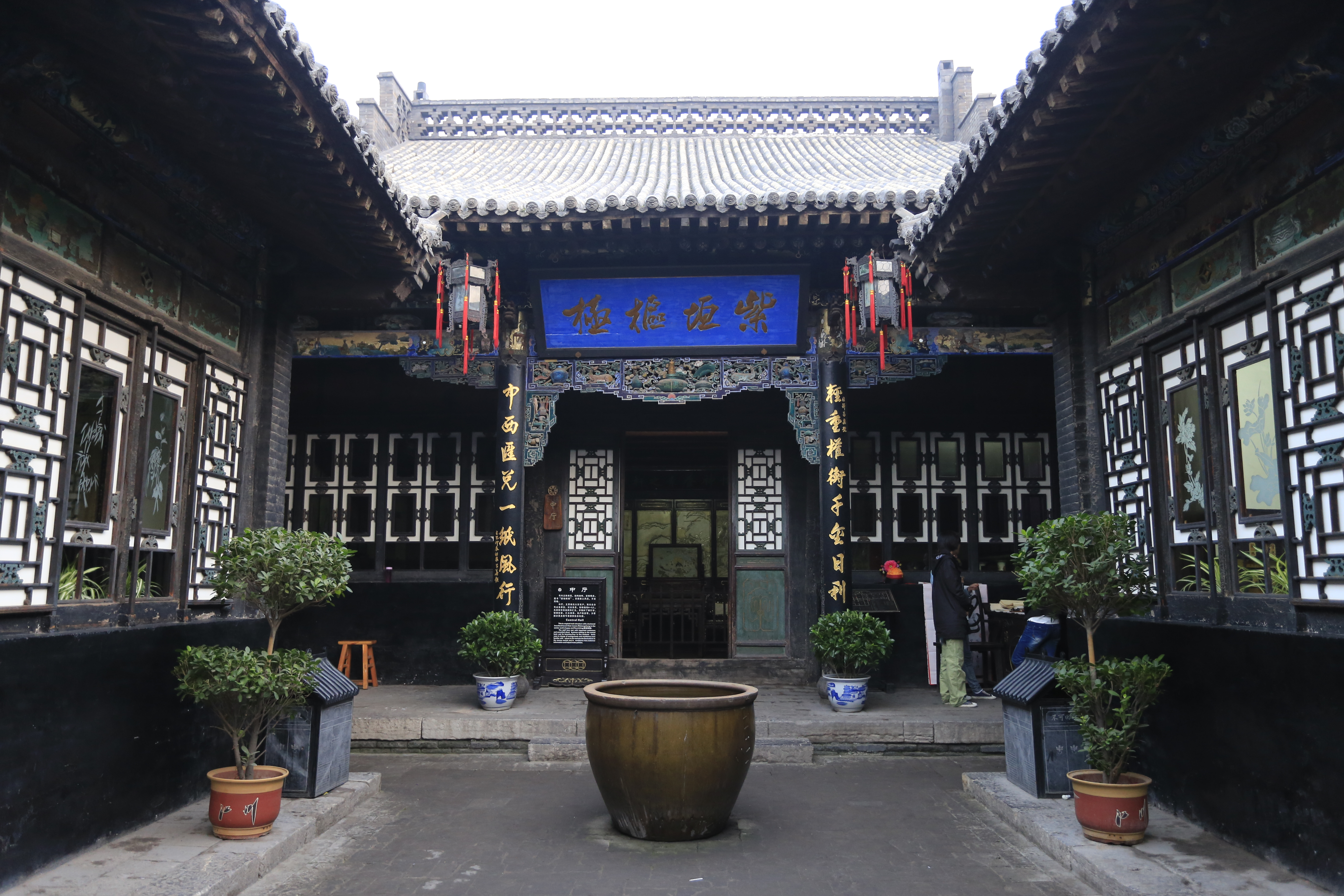 平遥日昇昌舊址 —— “紫垣樞極”